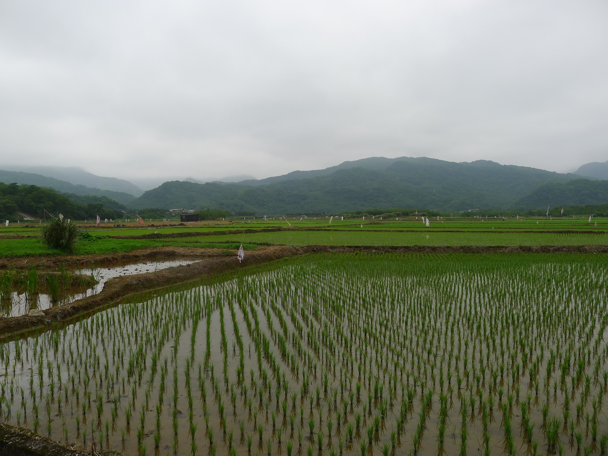 田寮洋鐵軌下